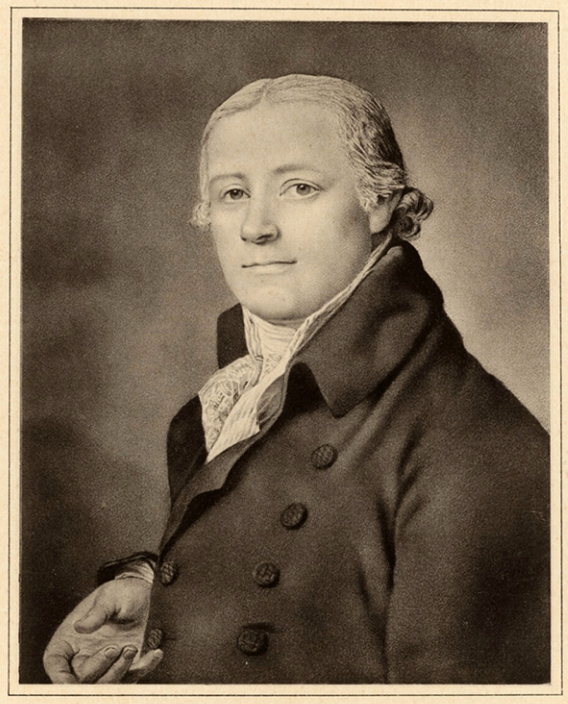 Der Leipziger Verleger Johann Ambrosius Barth